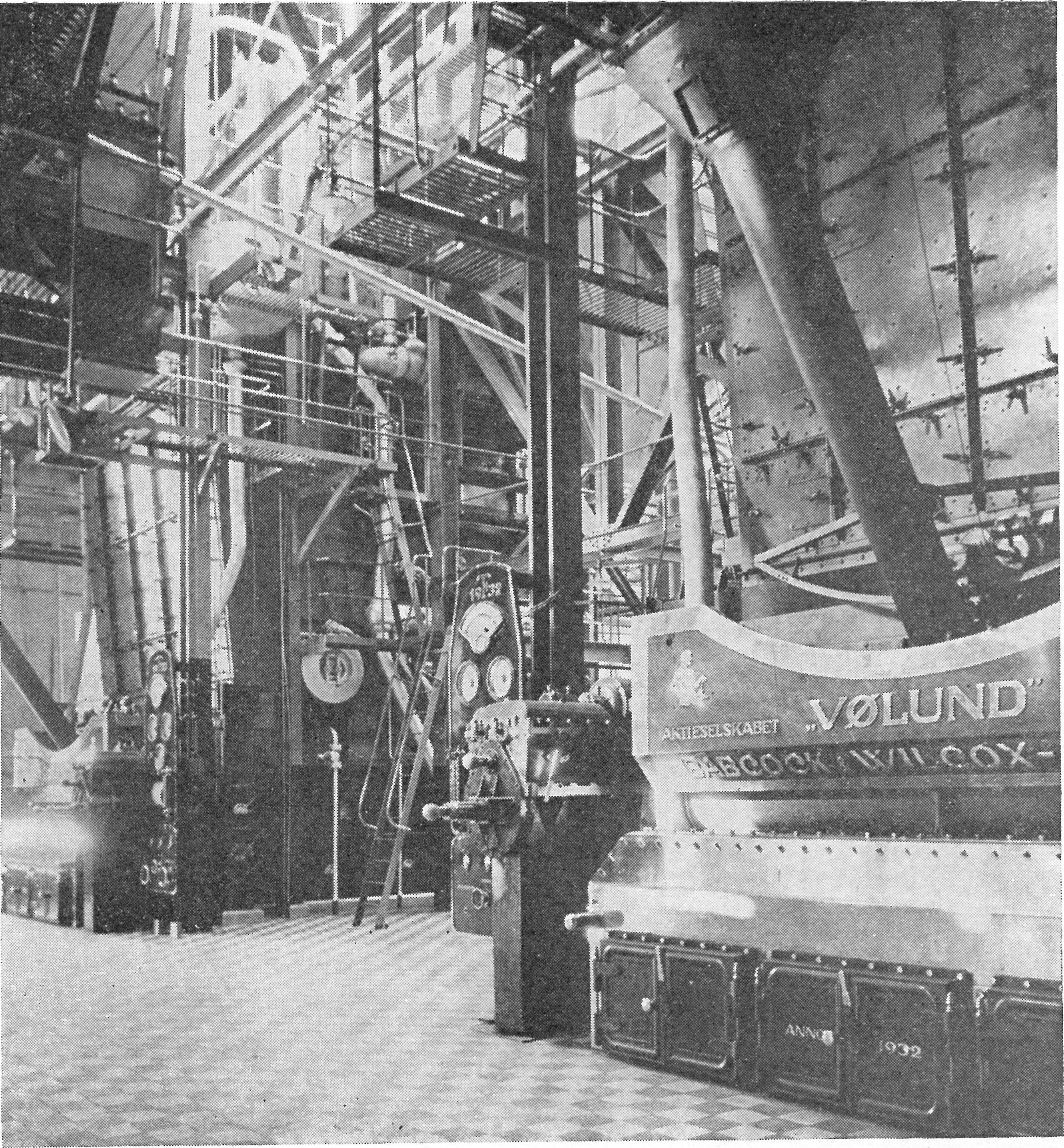 Tuborgs Kedelhus før Attentatet